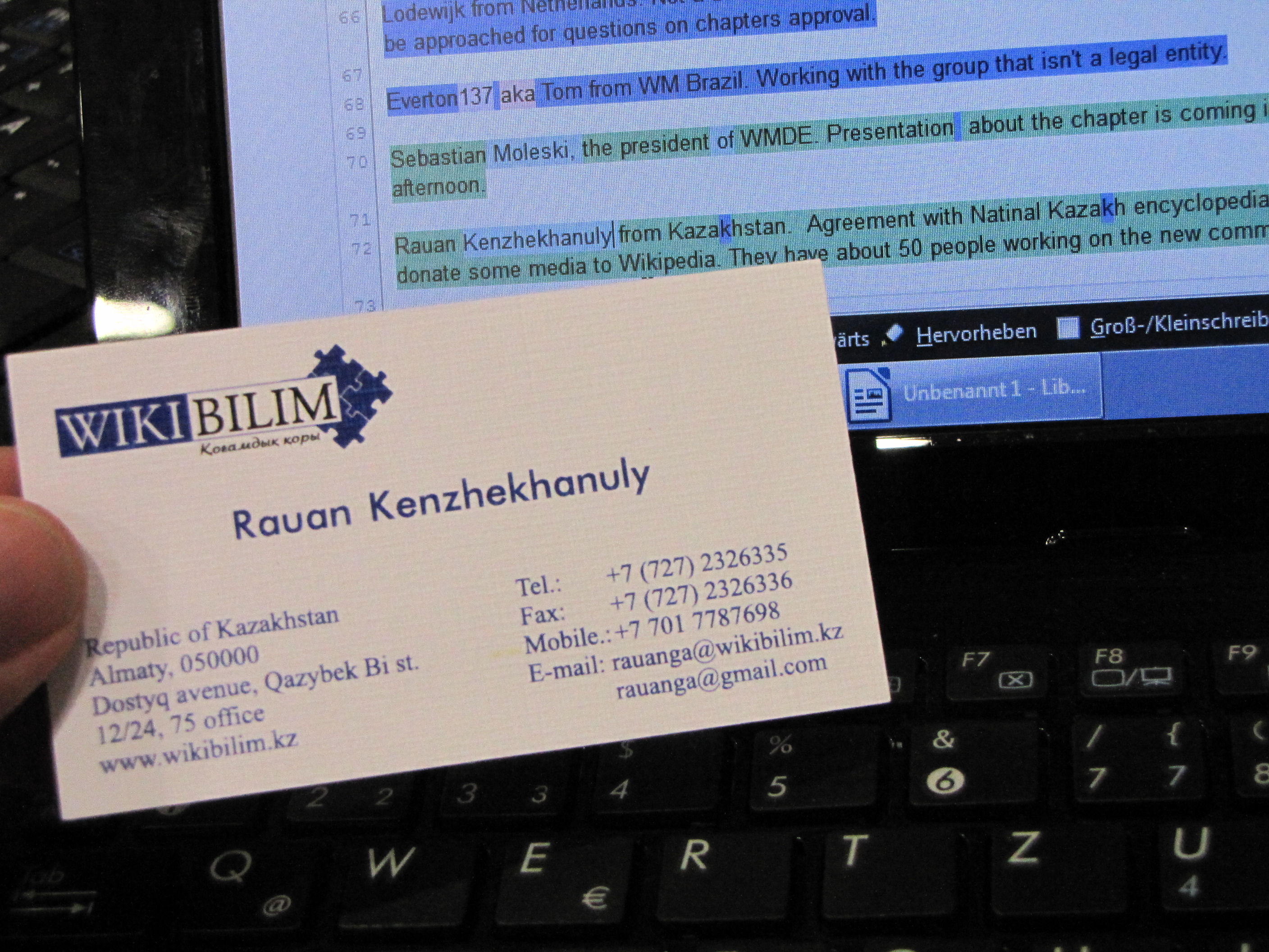 Wikimania 2011 in Haifa. Visitenkarte von Rauan, zur Korrektur der Notizen im Etherpad. Zufällig später zum Global Wikipedian des Jahres gewählt, weil er in Kasachstan die Benutzerzahlen nach oben getrieben hat.